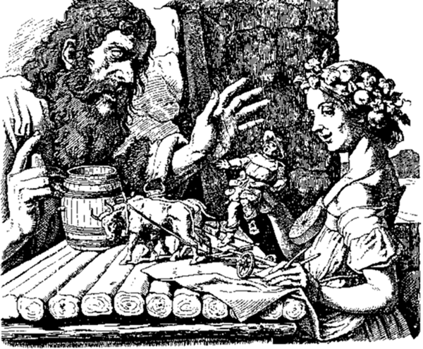 Riesen-Spielzeug (pictured in Adelbert von Chamisso's book Sämtliche Werke, Bd. 1?)